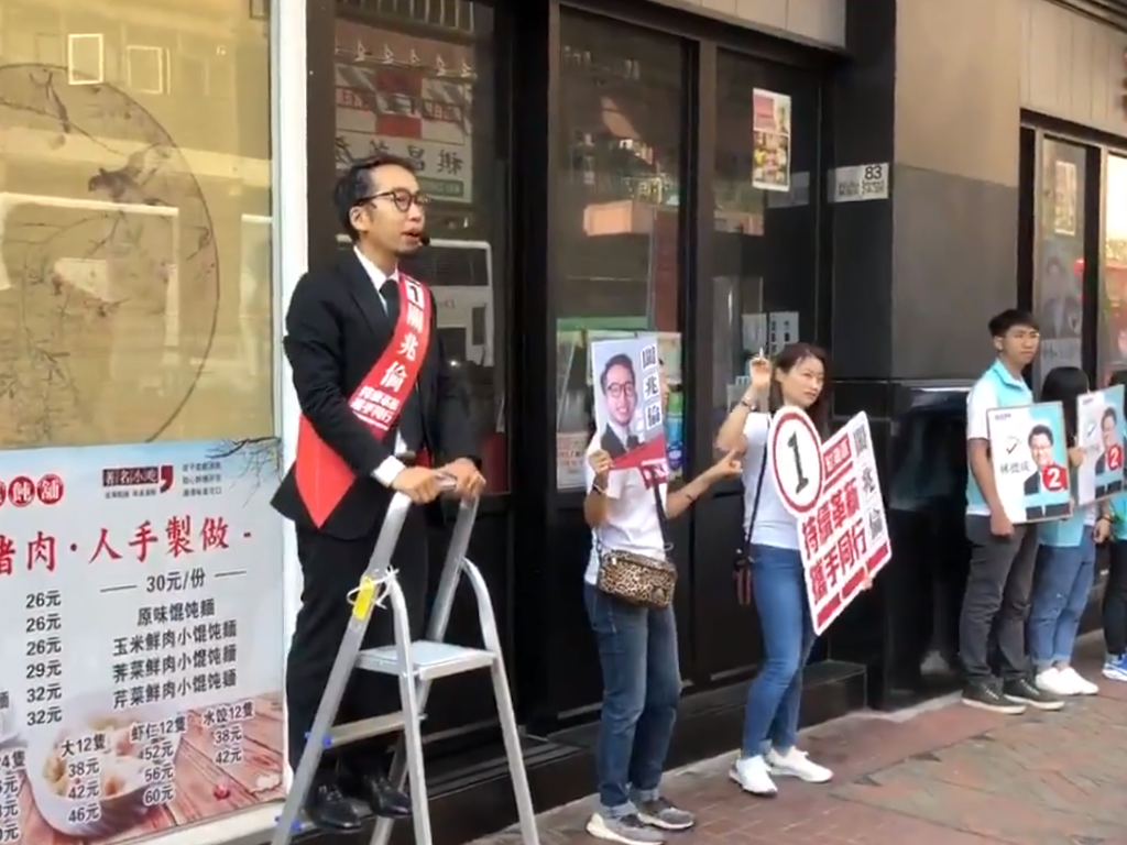 在红磡几个投票站附近的芜湖街上，主张民主和民主的建筑师关兆伦在卖力拉票，希望挑战现任区议员、亲中民建联的林德成。